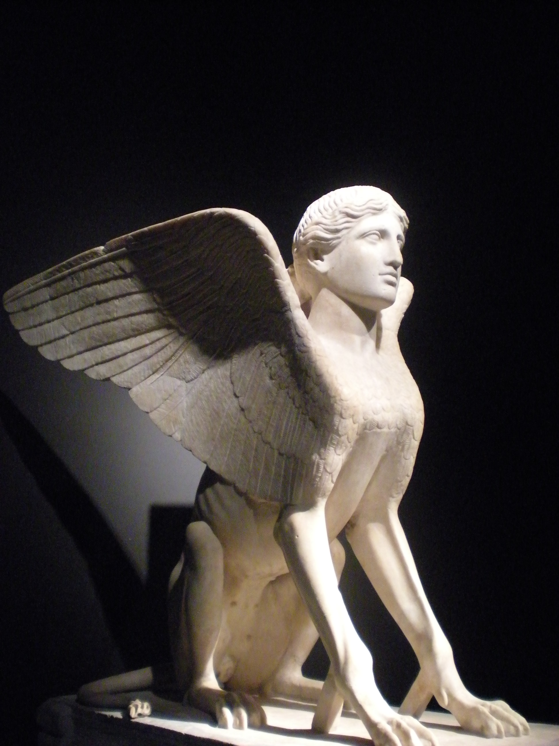 Esfinge de mármol, probablemente era la base de una mesa, con cabeza de mujer, cuerpo de léon y alas de águila. Las estatuas de esfinges solían ser hitos funerarios en su papel de guardianas de las tumbas. Época romana, circa 120-140 d. C., procedente de Monte Cagnolo, en las afueras de Lanuvium, cerca de Roma, Italia. Dimensiones: 840 mm x 800 mm x 550 mm. GR 1805,0703.40 (escultura 1719). Pertenece a la exposición La belleza del cuerpo, en el MARQ. Forma parte de la exposición permanente del Museo Británico.